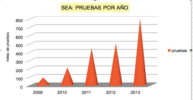 gráfica